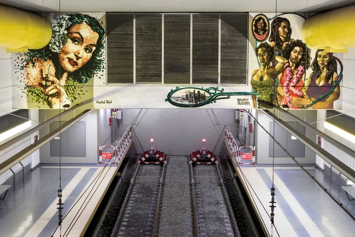 Murales de la estación Hospitales